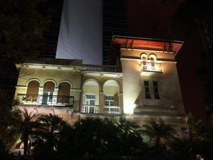 שימור בית בשדרות רוטשילד